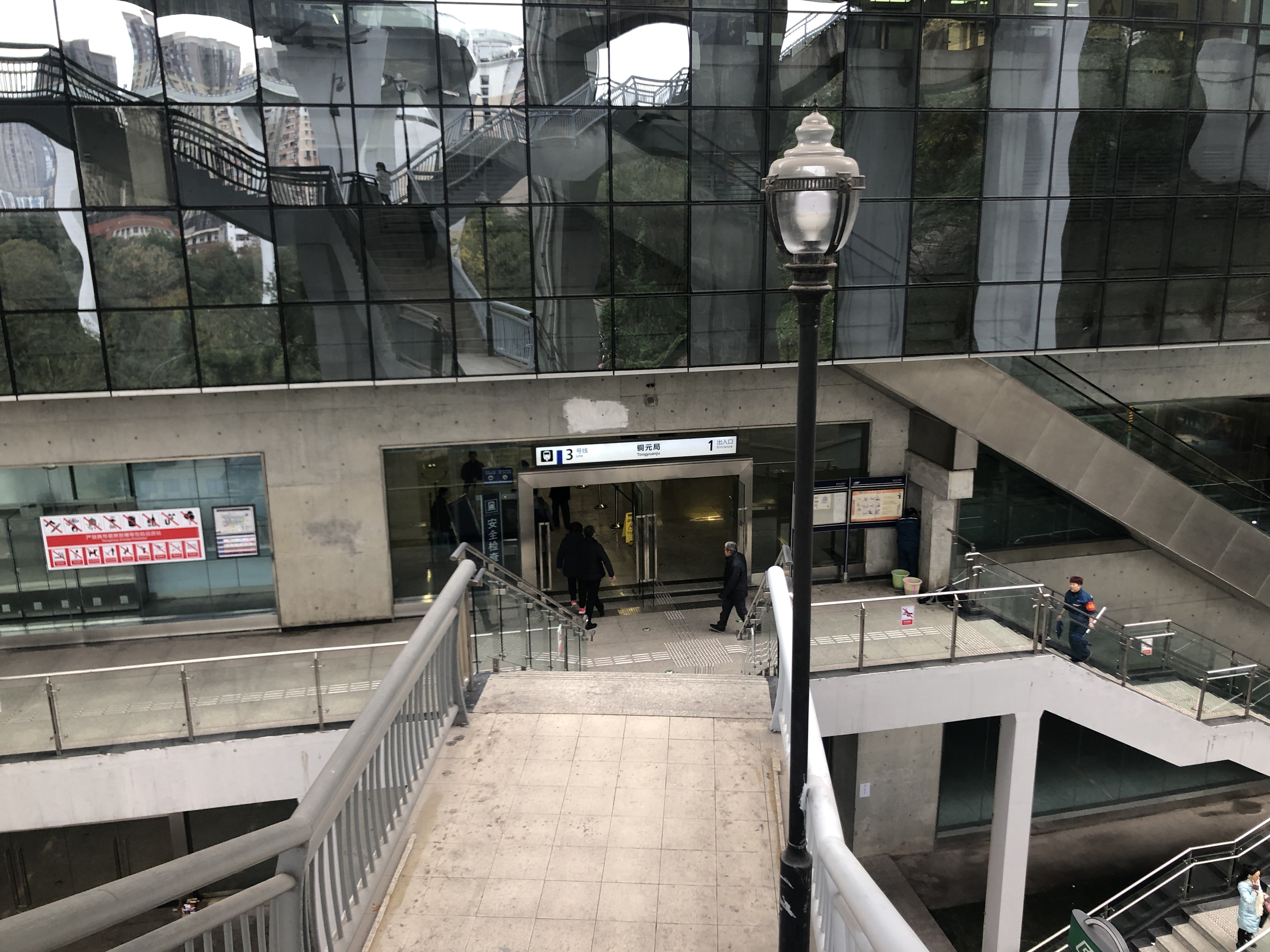 中文（中国大陆）: 3号线铜元局站1出口